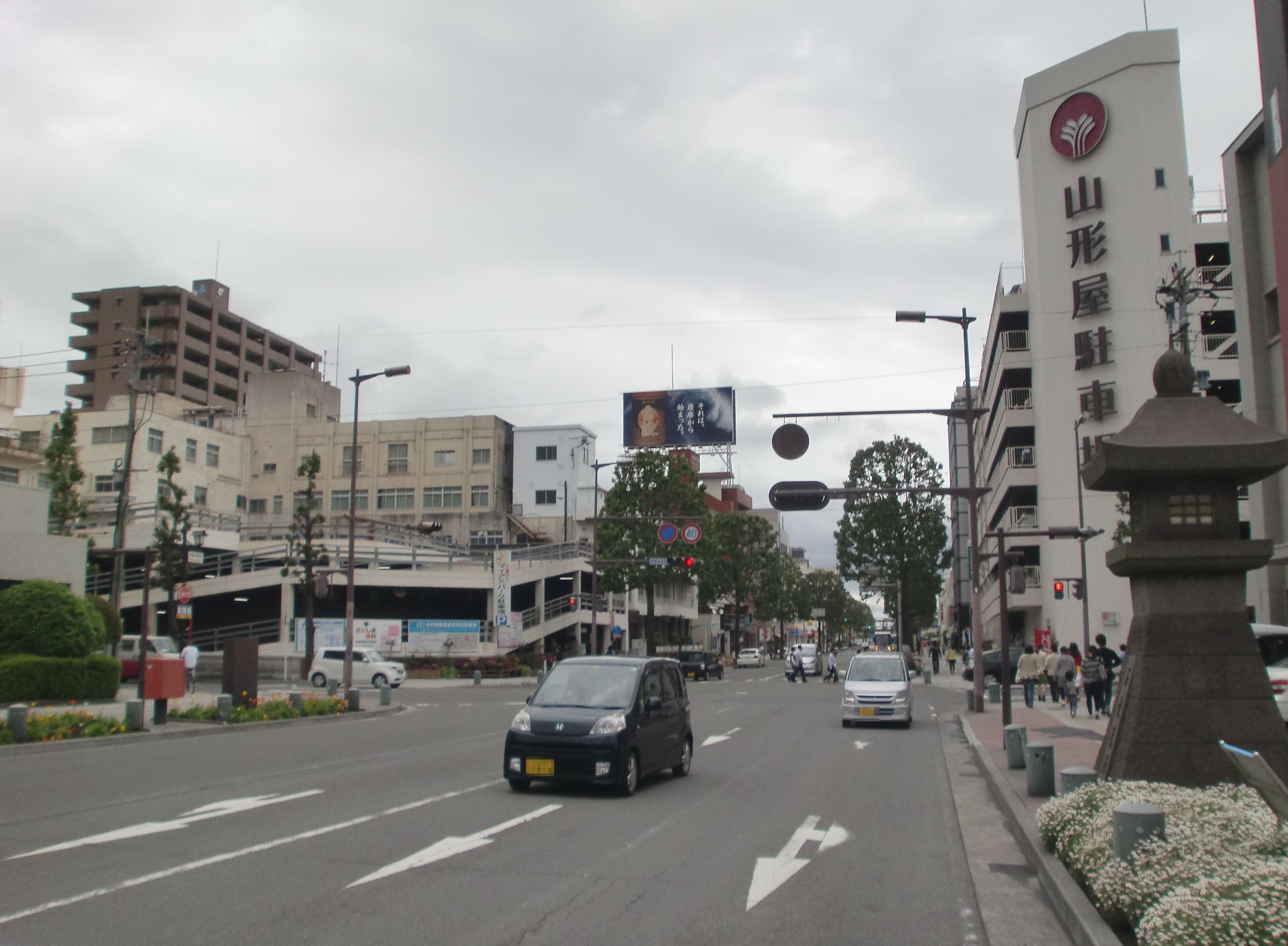 マイアミ通りをいづろ交差点から鹿児島港方面を望む。鹿児島市とマイアミ市との姉妹都市盟約締結を記念して名づけられた。